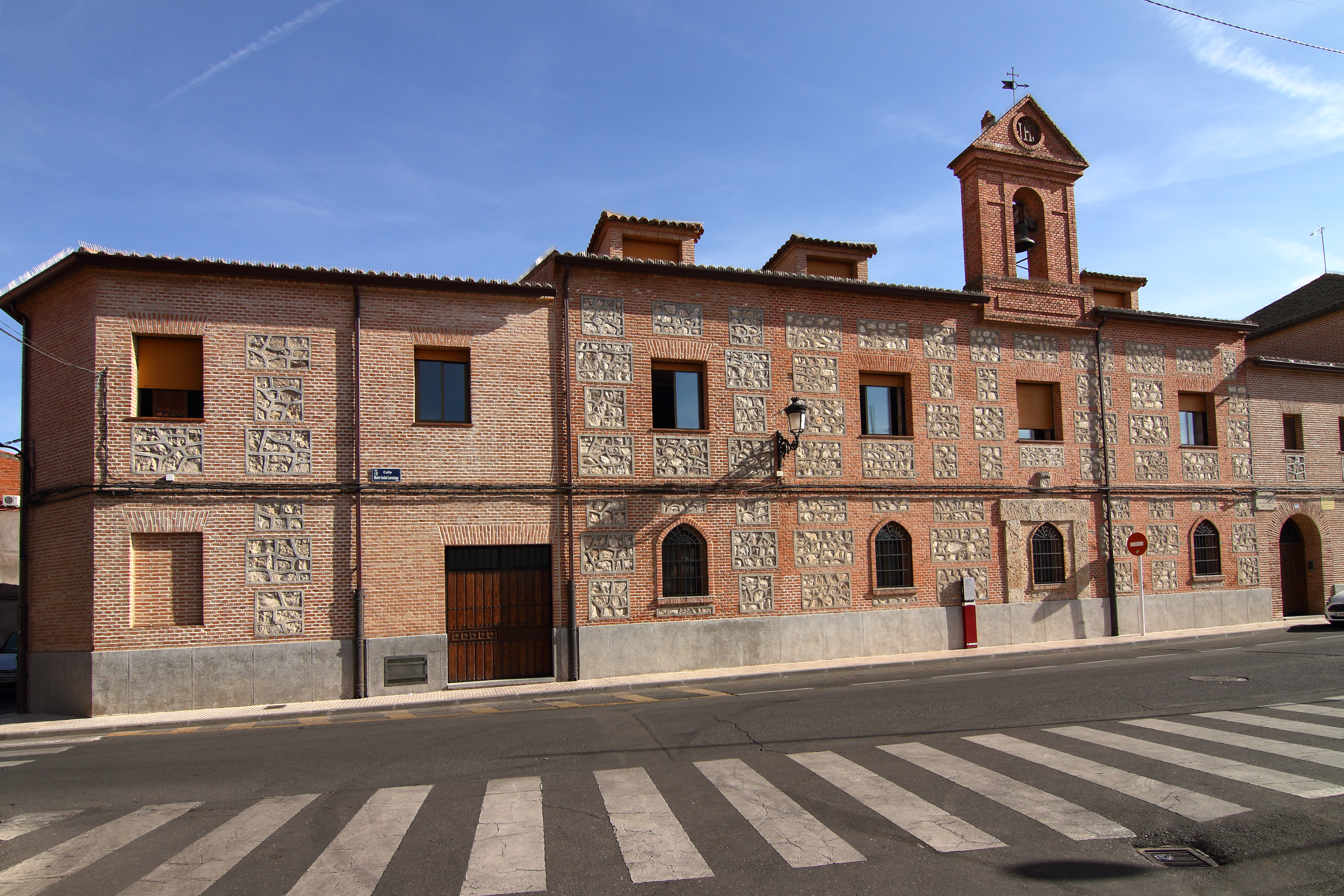 Colegio San José, Antiguo Convento de los P.P. Franciscanos